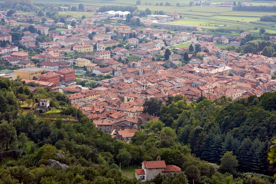 Panorama di Montalto Dora visto dal castello